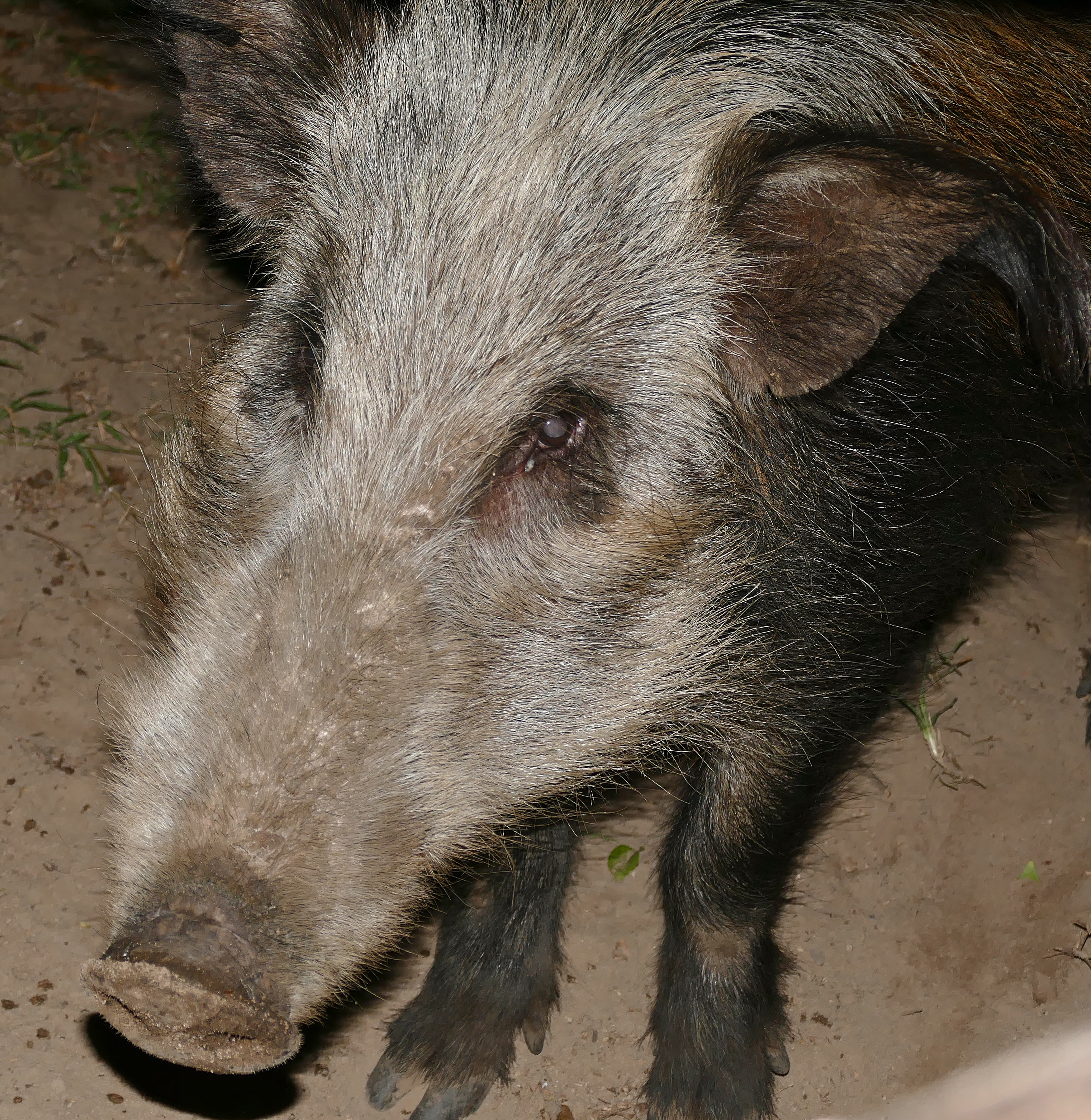 Mpila Camp, iMfolozi Game Reserve, Hluhluwe-iMfolozi Park, Kwazulu-Natal, SOUTH AFRICA